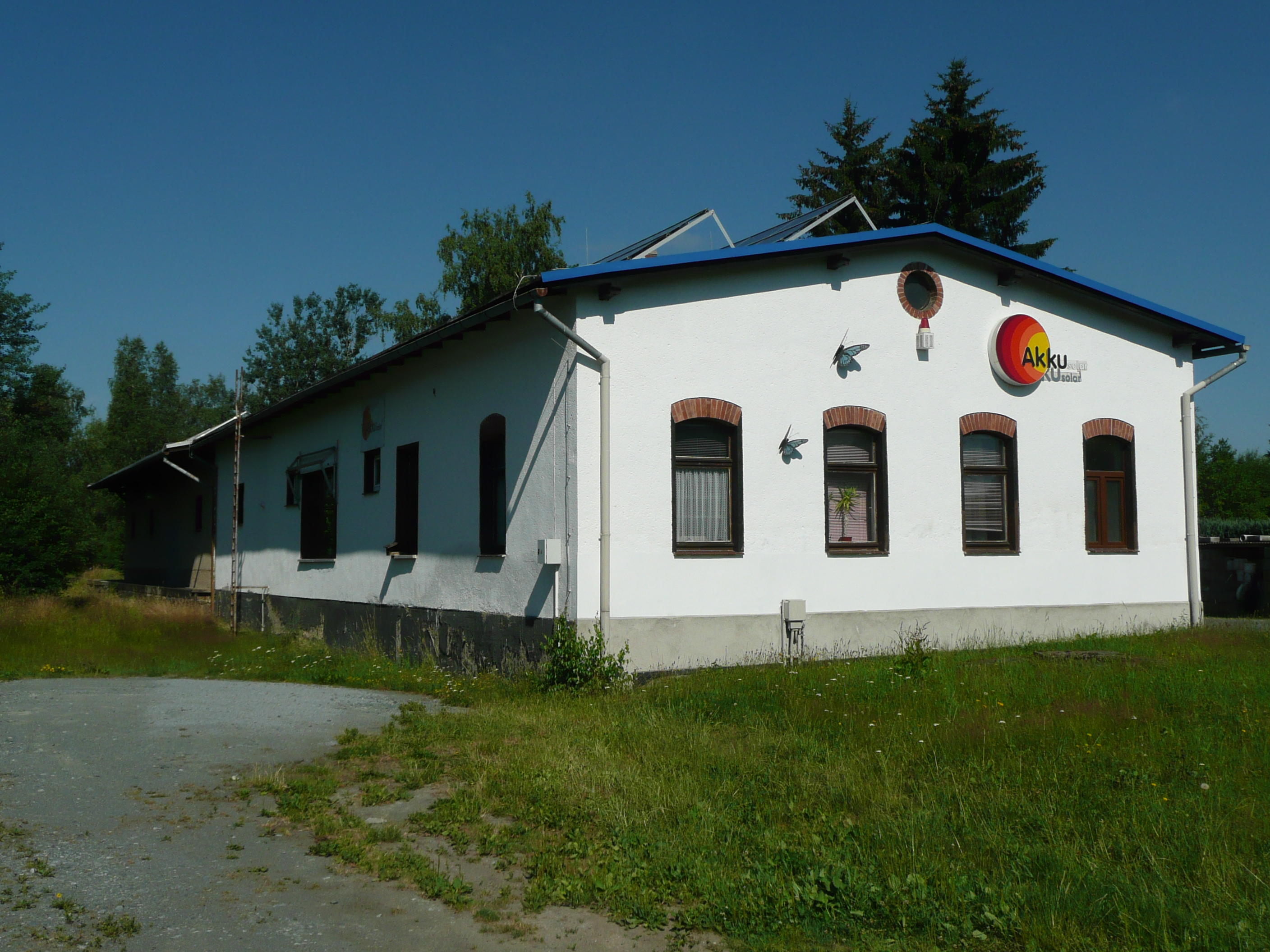 Güterschuppen auf dem Schmalspurteil der ehemaligen Kleinbahnstation in Taubenheim